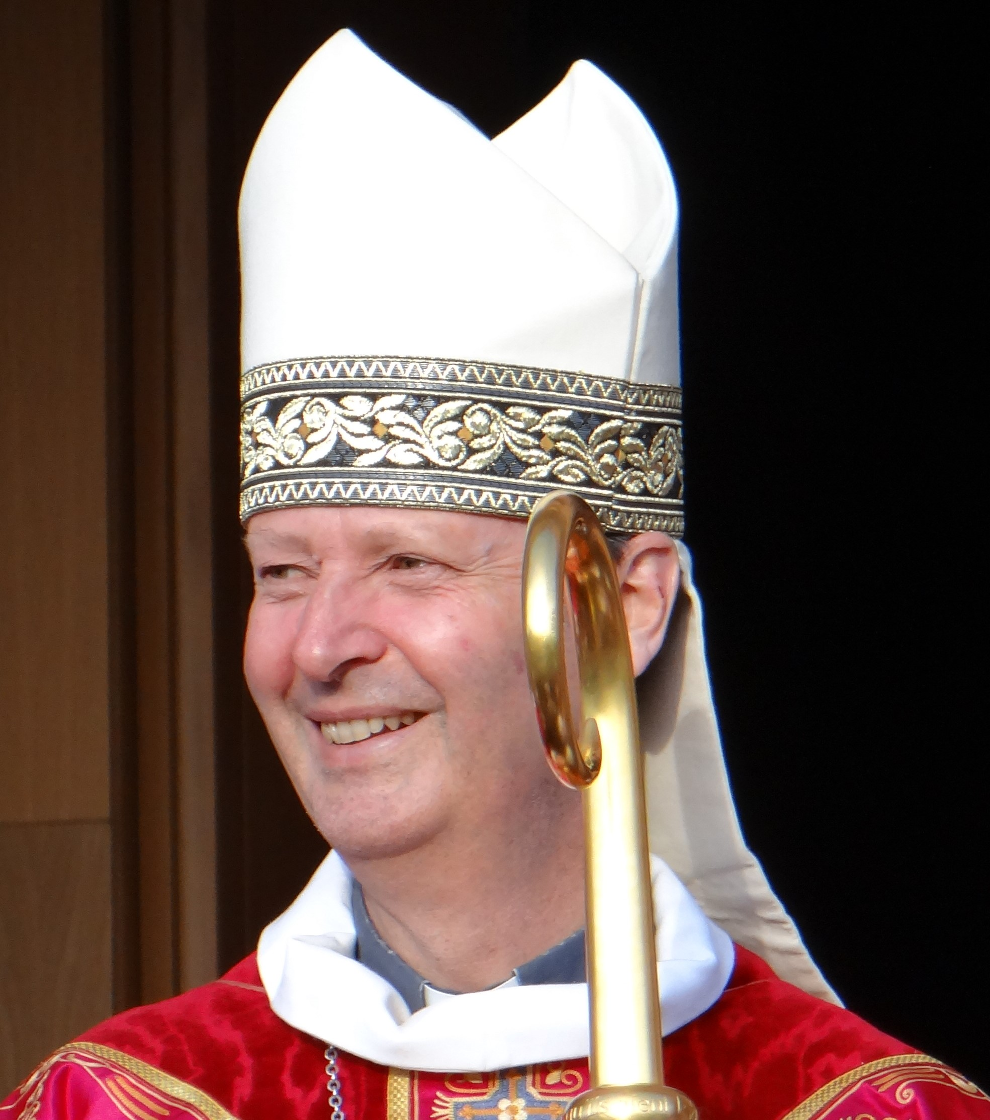 Didier Berthet sur le parvis de la Cathédrale de Saint Dié des Vosges, 8 juin 2019